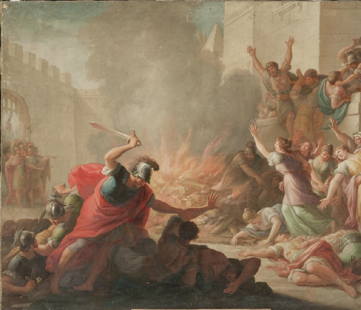 La obra representa la toma de Numancia por los soldados romanos. Primer premio de pintura en 1802. Recortado por la derecha donde el lienzo presenta un daño importante